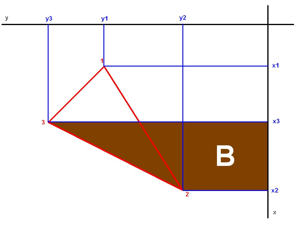 Výpočet plochy pomocí L´Huillierových vzorců - Plocha B